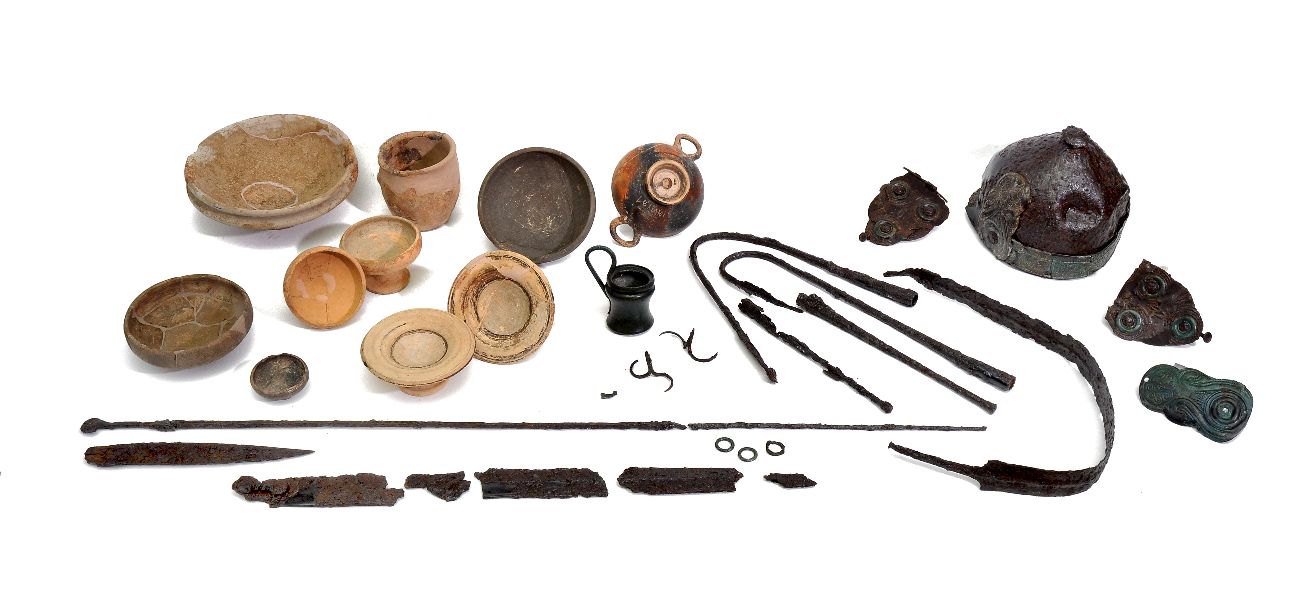 Corredo della tomba 14 proveniente da Monte Bibele